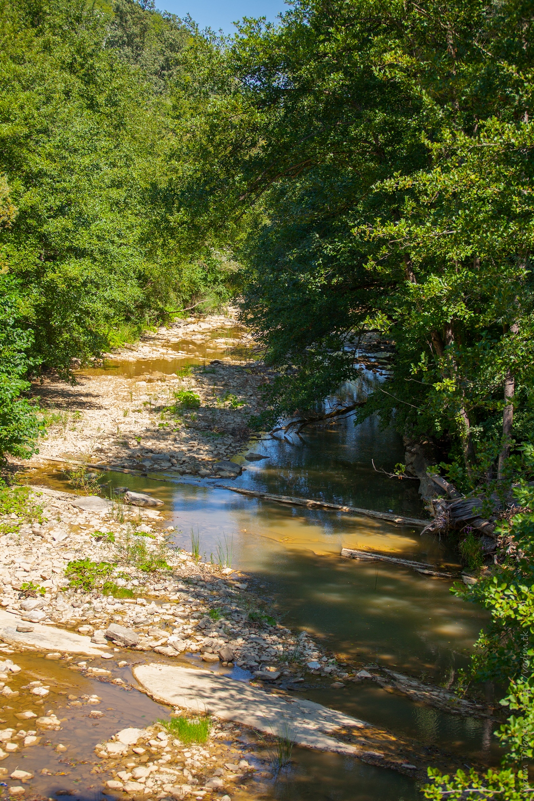 Низовья реки Каверзе, поблизости от места впадения в Псекупс